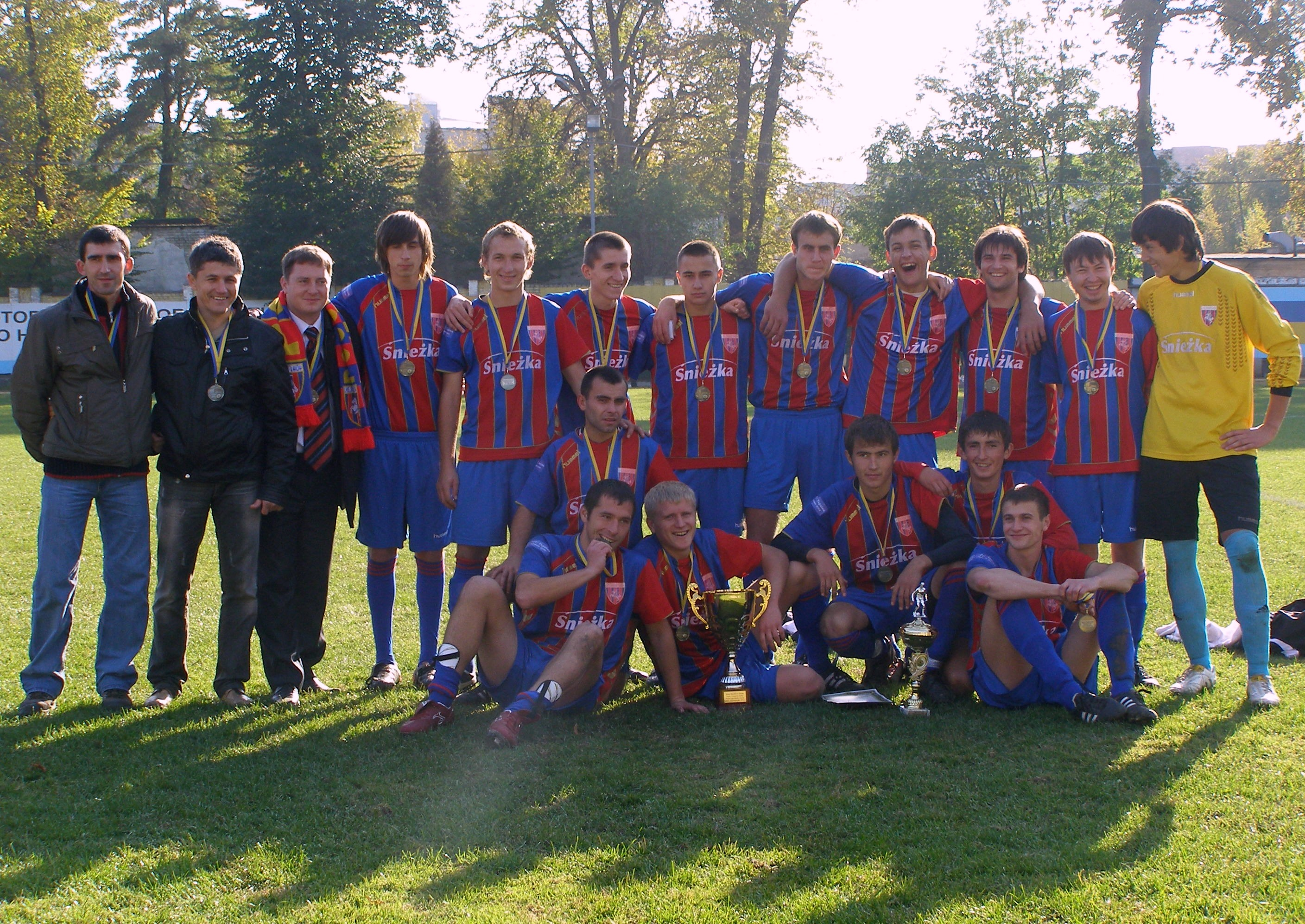 Pogon Lwiw (Pogoń Lwów) - der Meister von Lwiw in der Saison 2010. Team posiert mit Goldmedaillen